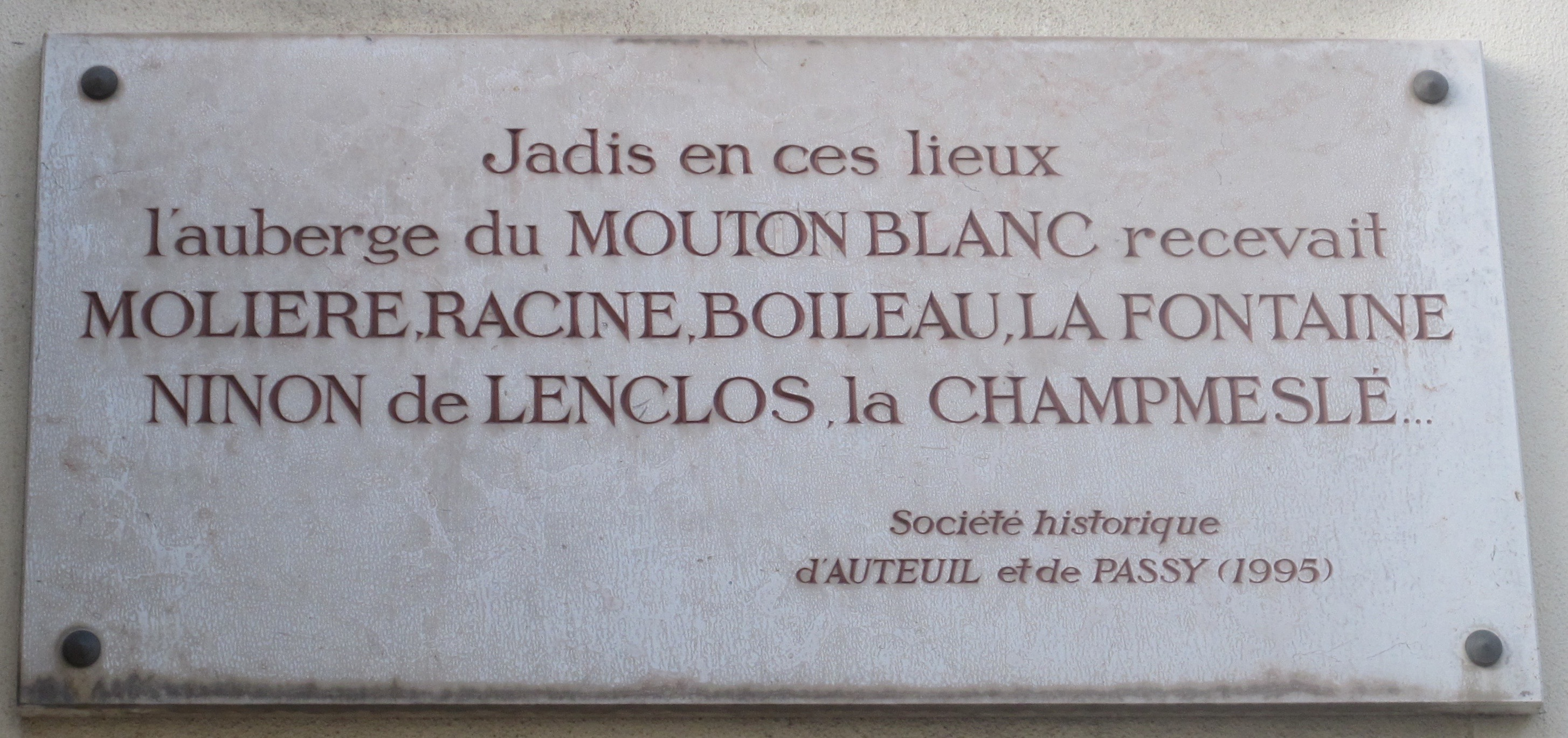 Plaque en hommage à l'auberge du Mouton blanc (où sont venus Molière, Racine, Boileau, La Fontaine, Ninon de Lenclos, la Champmeslé), 40 rue d'Auteuil (Paris, 16e).